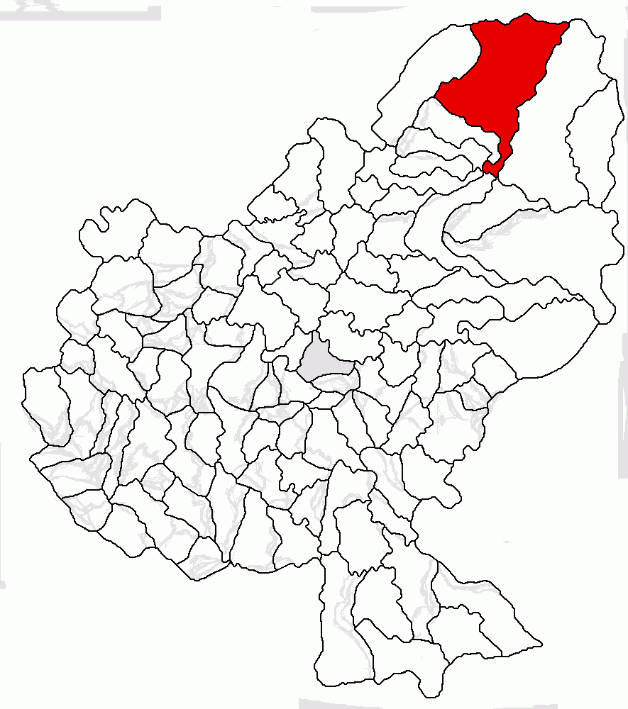 Categorie:Hărţi ale judeţului Mureş